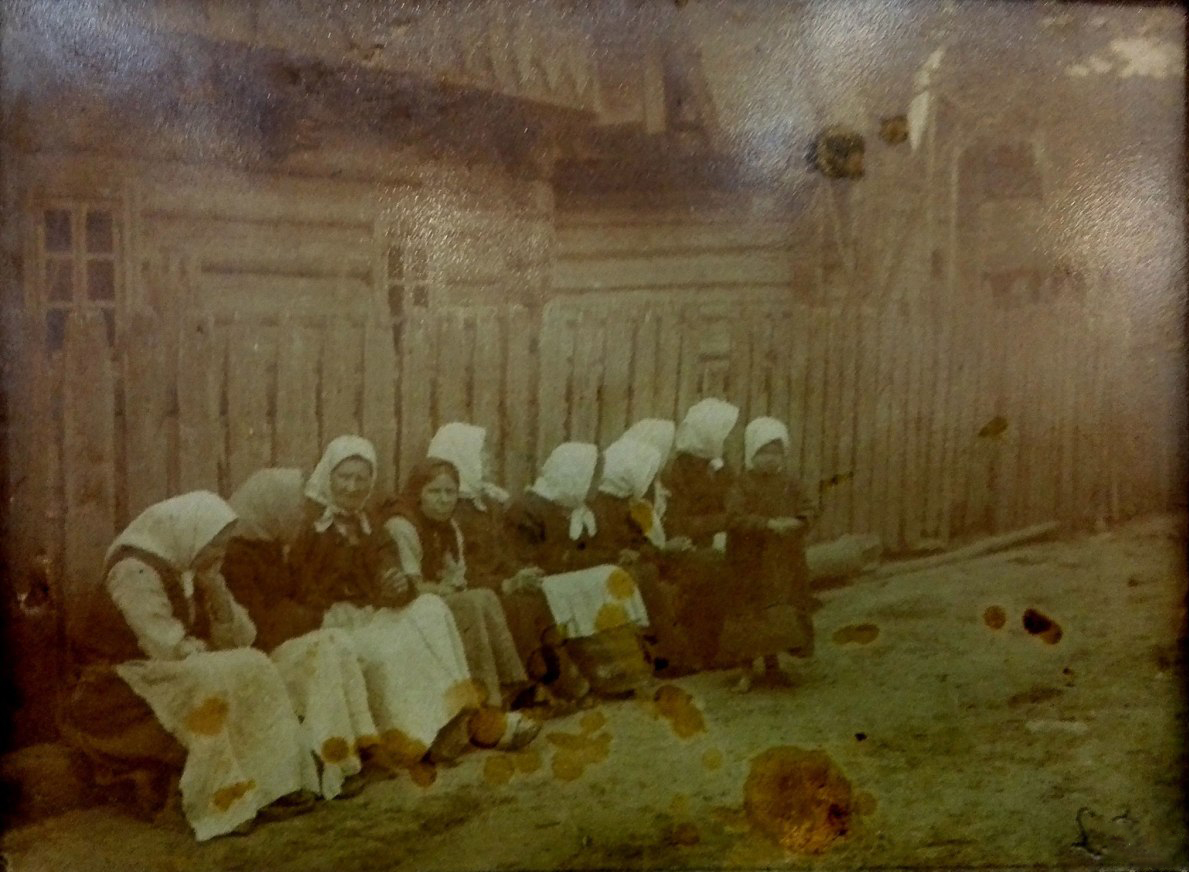 Беларуская (тарашкевіца): Хатляны (Chatlany). Жанчыны ў нядзелю